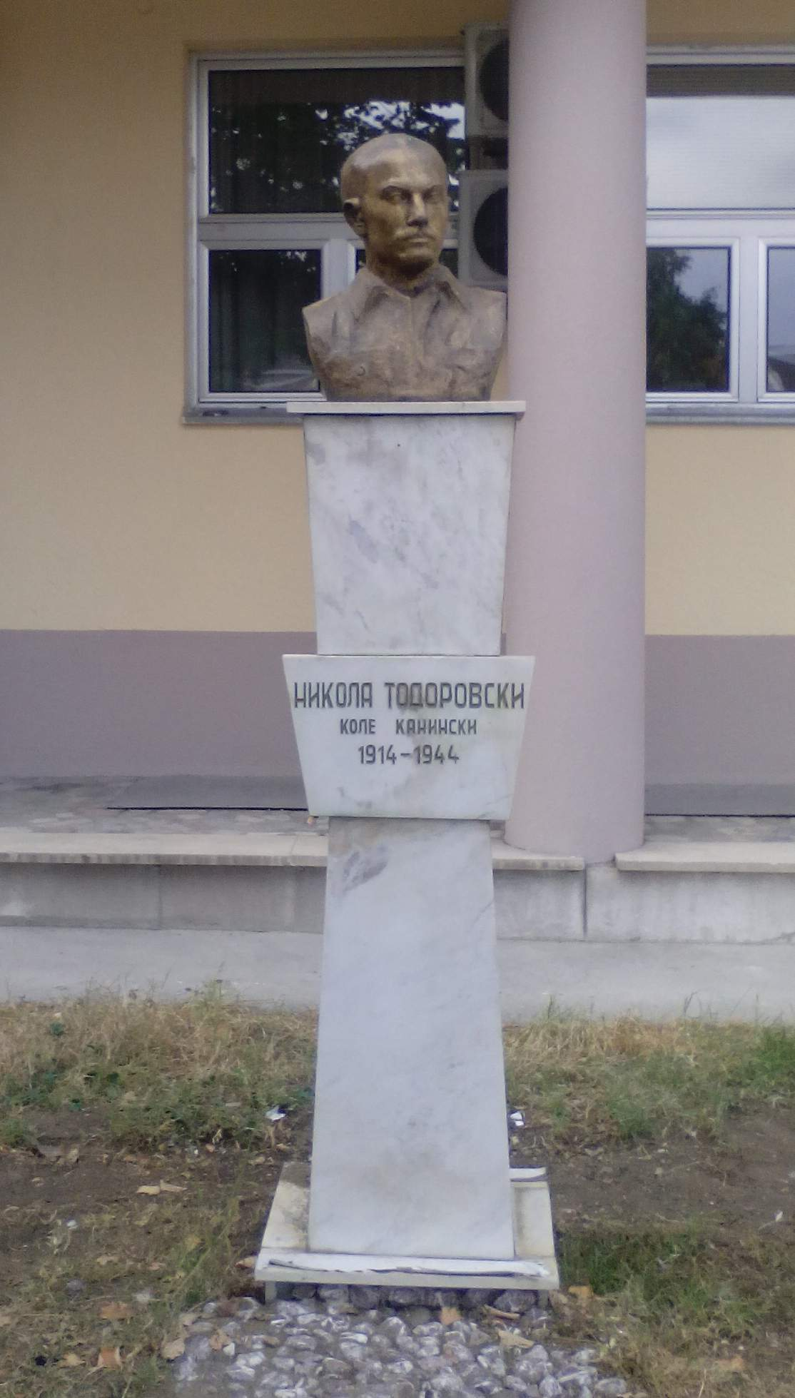 Биста на Коле Канински пред Судот во Битола